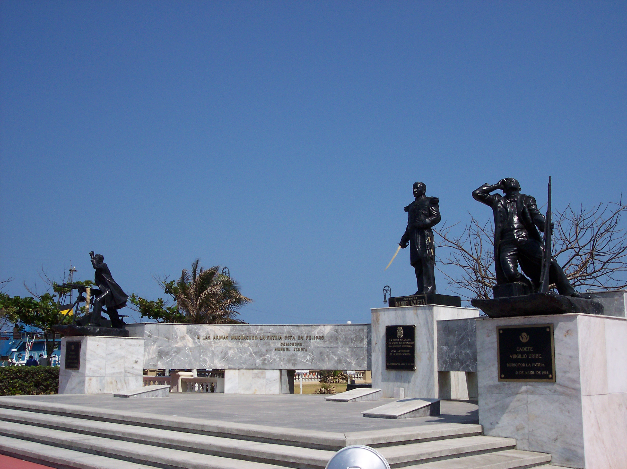 This is a monument remembering the battle and defence of Veracruz City in april 21st, 1914. From left to right: Teniente José Azueta, Comodoro:Manuel Azueta, Cadete Virgilio Uribe. All of them died in that date. SPANISH: Monumento en memoria a la batalla y defensa de la Ciudad de Veracruz el 21 de Abril de 1914. De izquierda a derecha: Teniente José Azueta, Comodoro:Manuel Azueta, Cadete Virgilio Uribe.Todos ellos murieron en la defensa. Port and City of Veracruz. Estate of Veracruz, Mexico. SPANISH: Ciudad y Puerto de Veracruz, Estado de Veracruz, México.